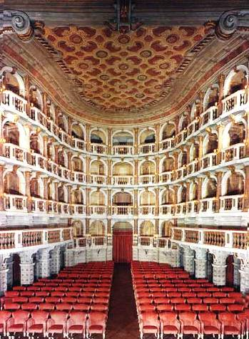 Teatro Scientifico di Mantova - realizzato da Antonio Bibbiena